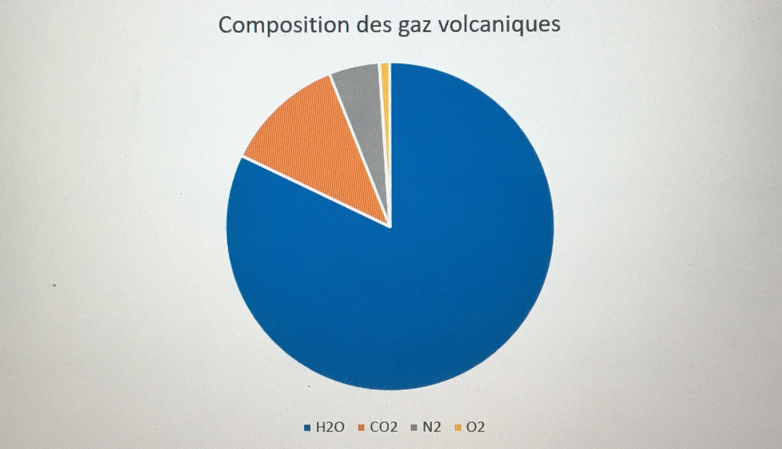 Composition par portions approximatives des gaz volcanique